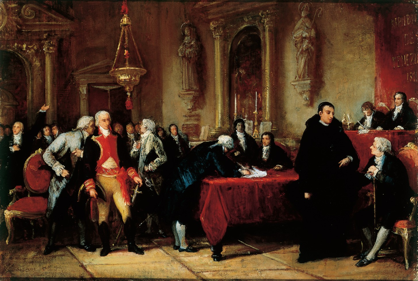 Boceto para la Fima del Acta de Independencia.